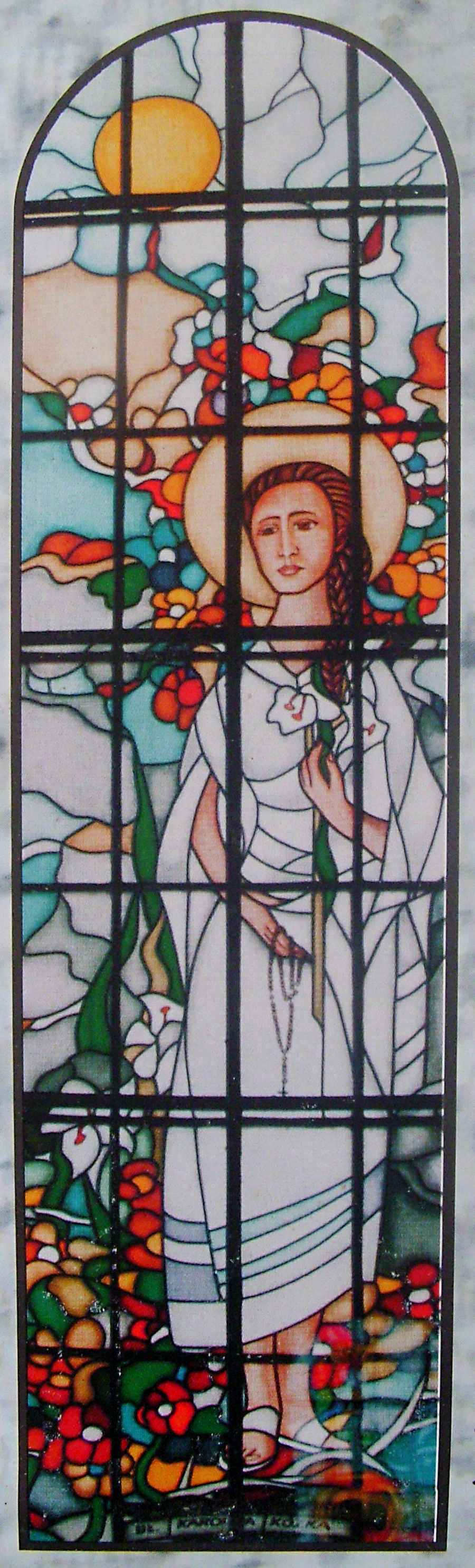 bł. Karolina Kózka - witraż w kościele Imienia Maryi w Bączalu Dolnym (diecezja rzeszowska)